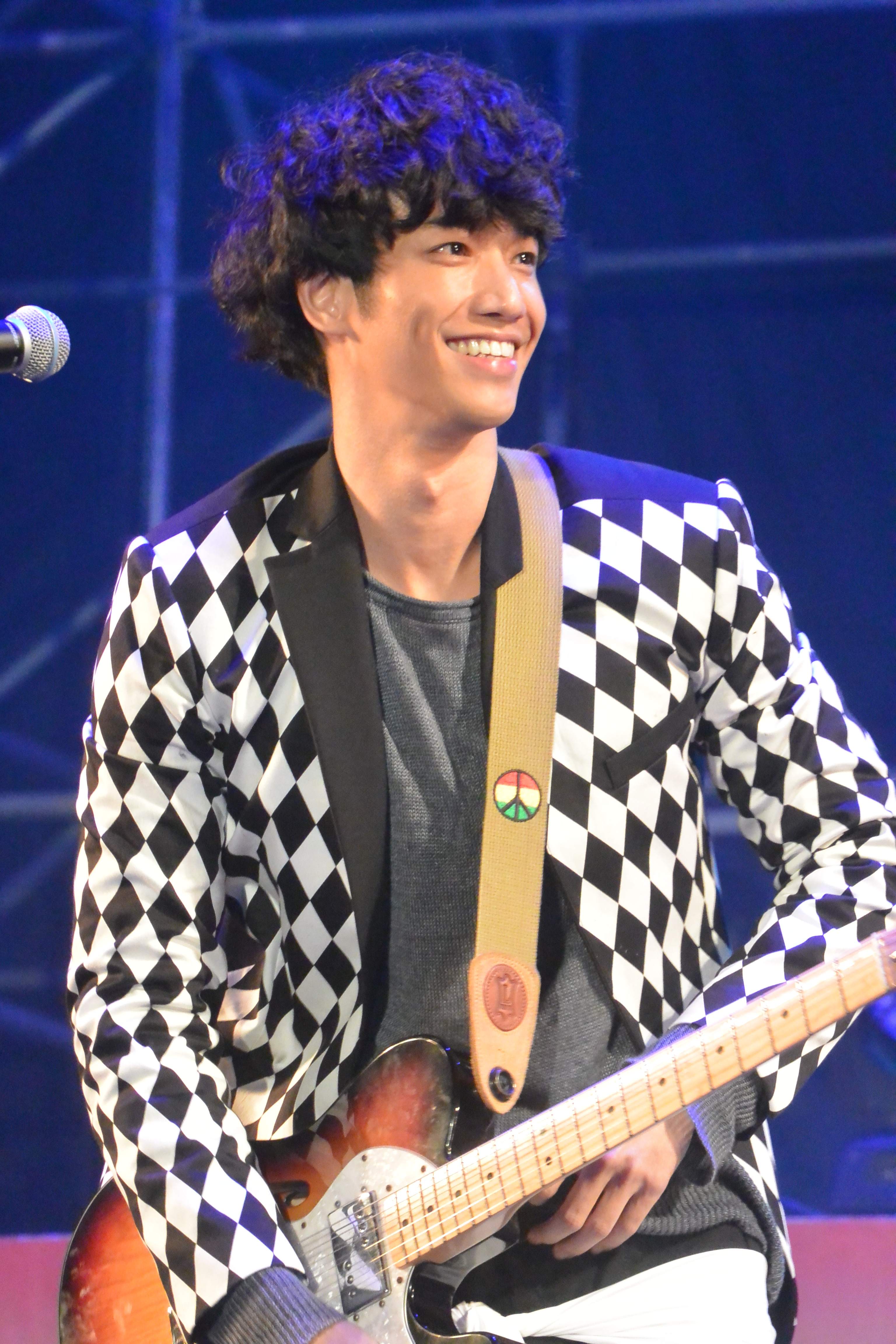 中文（台灣）: 劉以豪出席幸福嘉義市2014跨年晚會